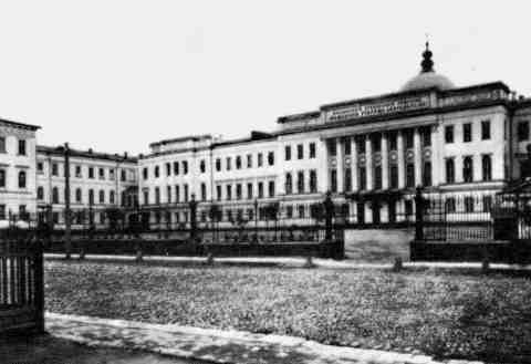 Здание мещанских училищ на Калужской улице (Ленинский просп., 6 строение 1 - Главный корпус МГИ НИТУ МИСиС, здание надстроено и перестроено)